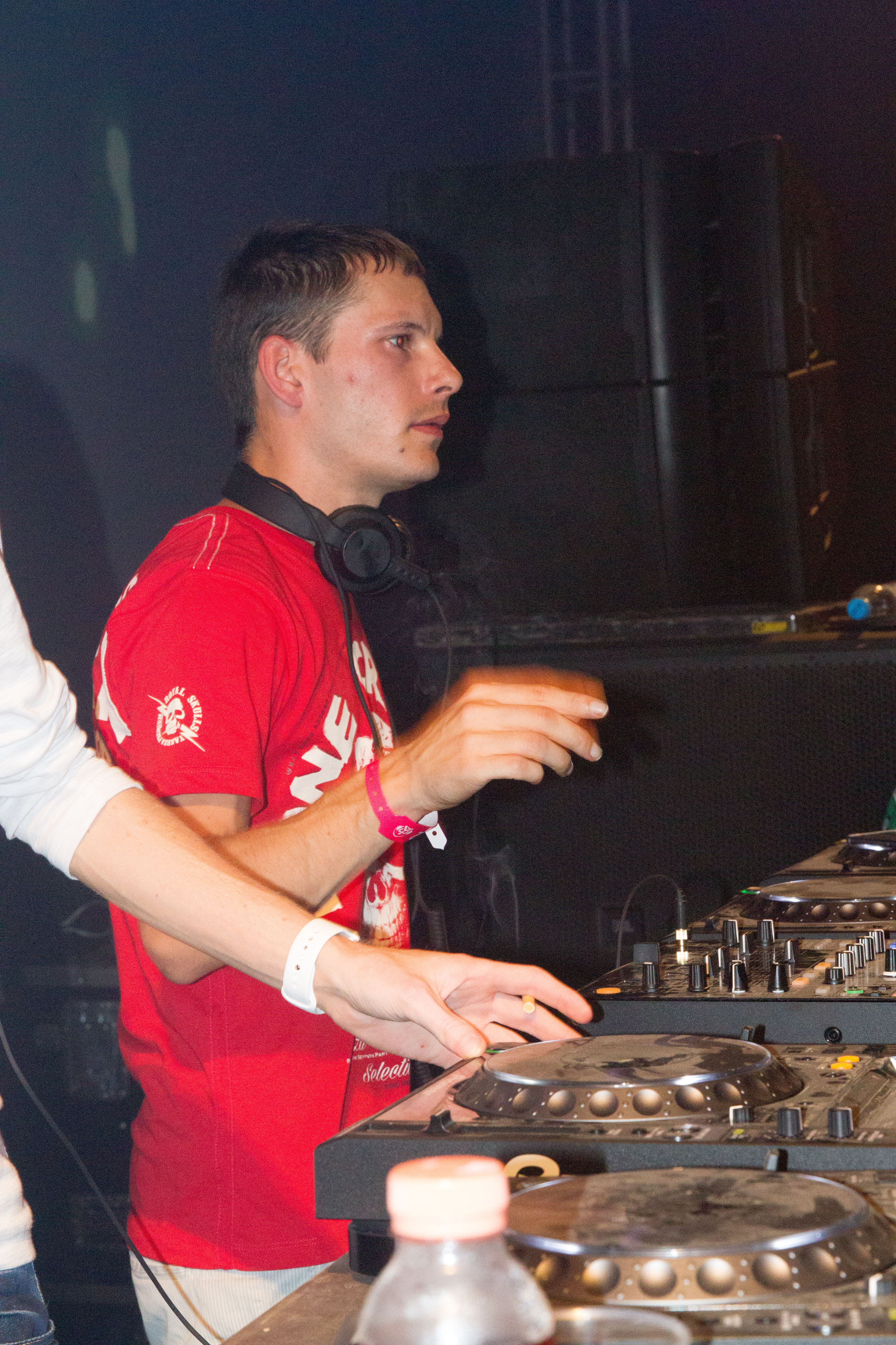 Gestoert aber GeiL beim 14. Airbeat-One Dance Festivals das vom 16. bis 19. Juli 2015 auf dem Flugplatz Neustadt-Glewe.